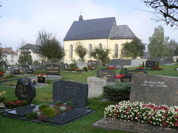 Friedhofskirche Zur Heiligen Dreifaltigkeit in Wunsiedel